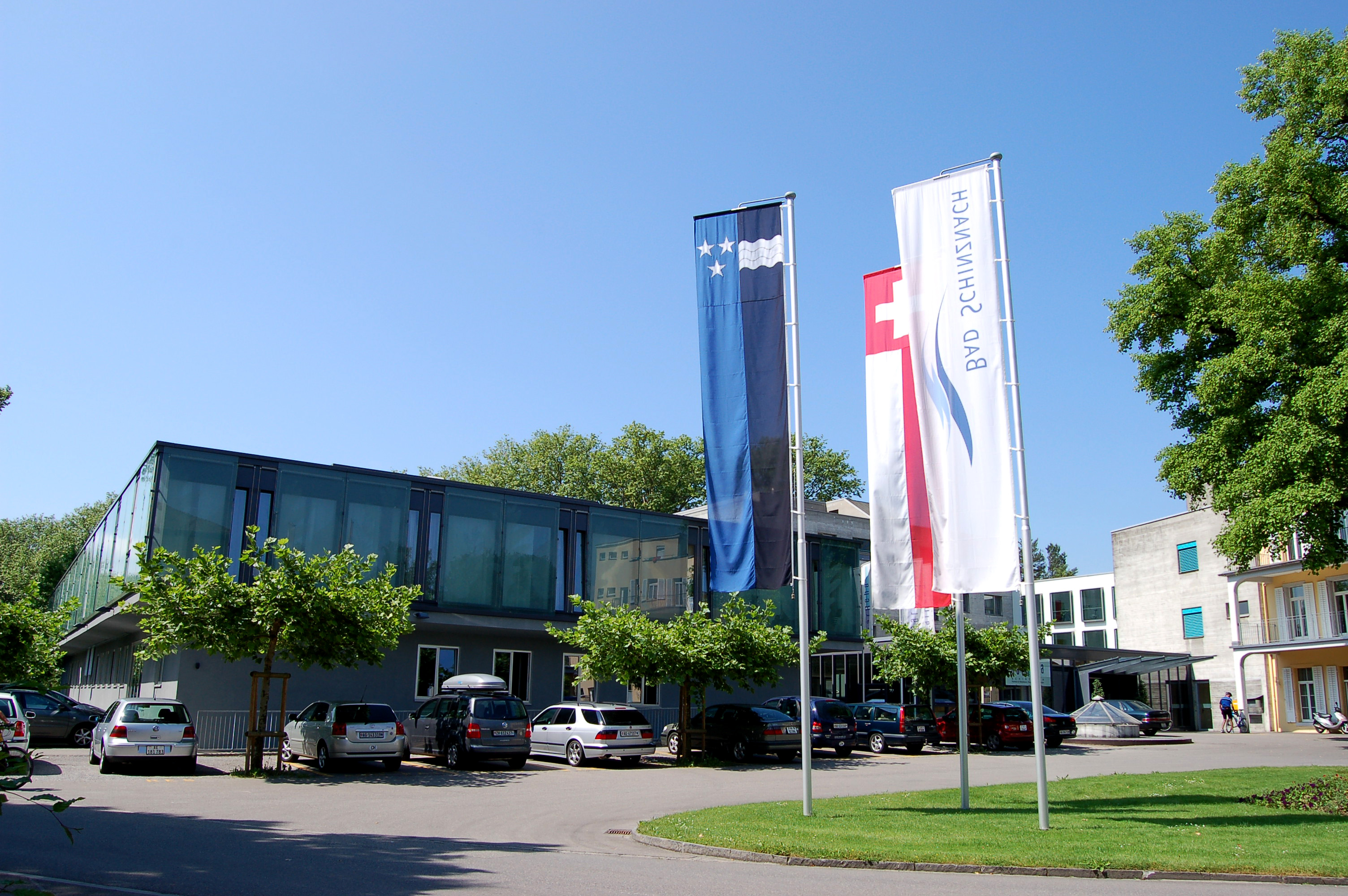 Schinznach Bad Reha Klinik